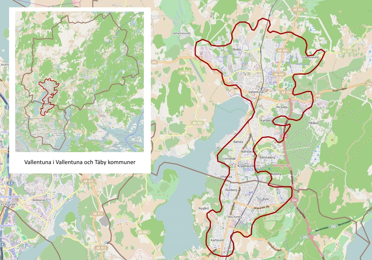 Tätorten Vallentunas gränser 1990 enligt Atlas över rikets indelningar 1992.